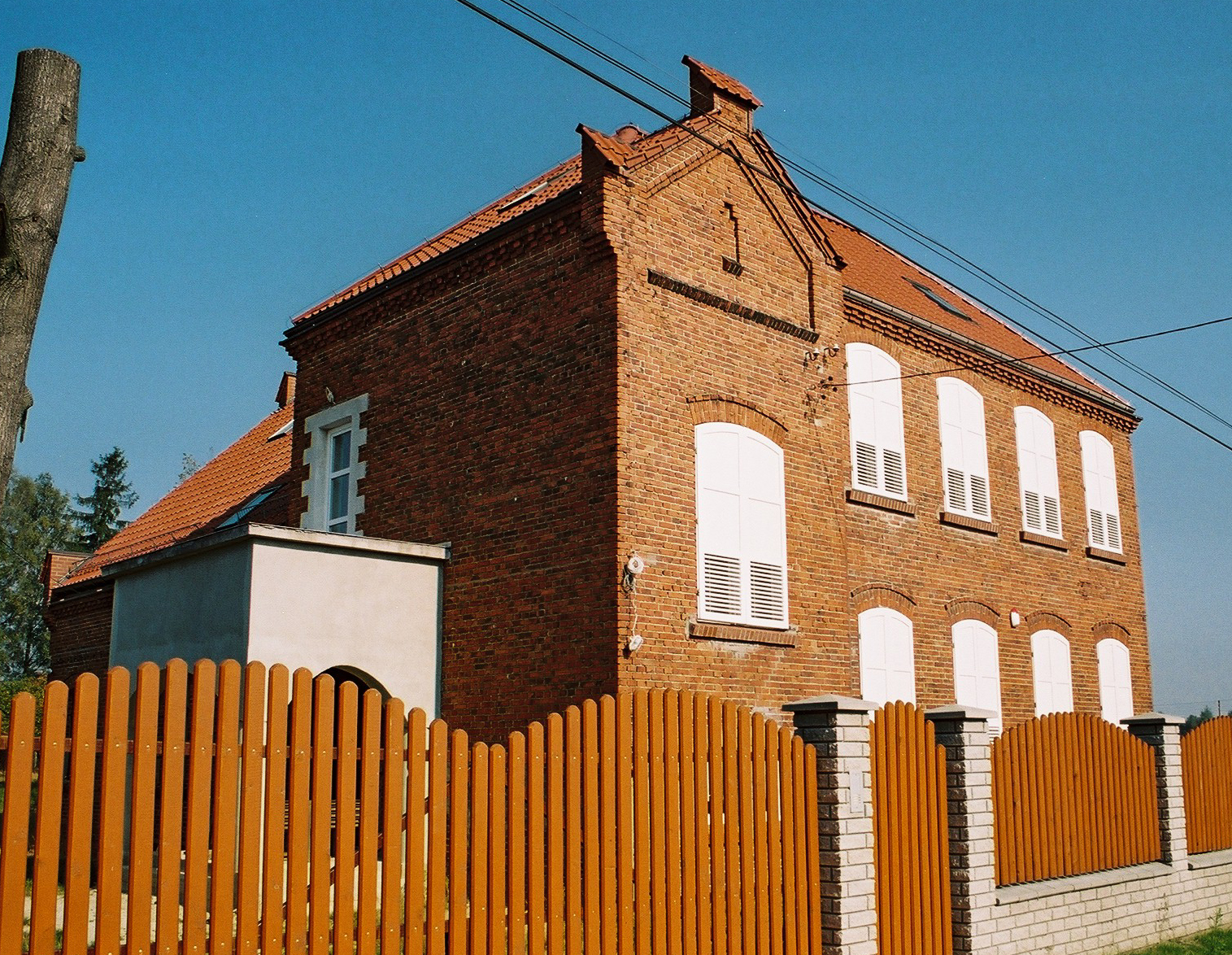 Budynek dawnej szkoły w Grojcu, gmina Boronów, powiat lubliniecki